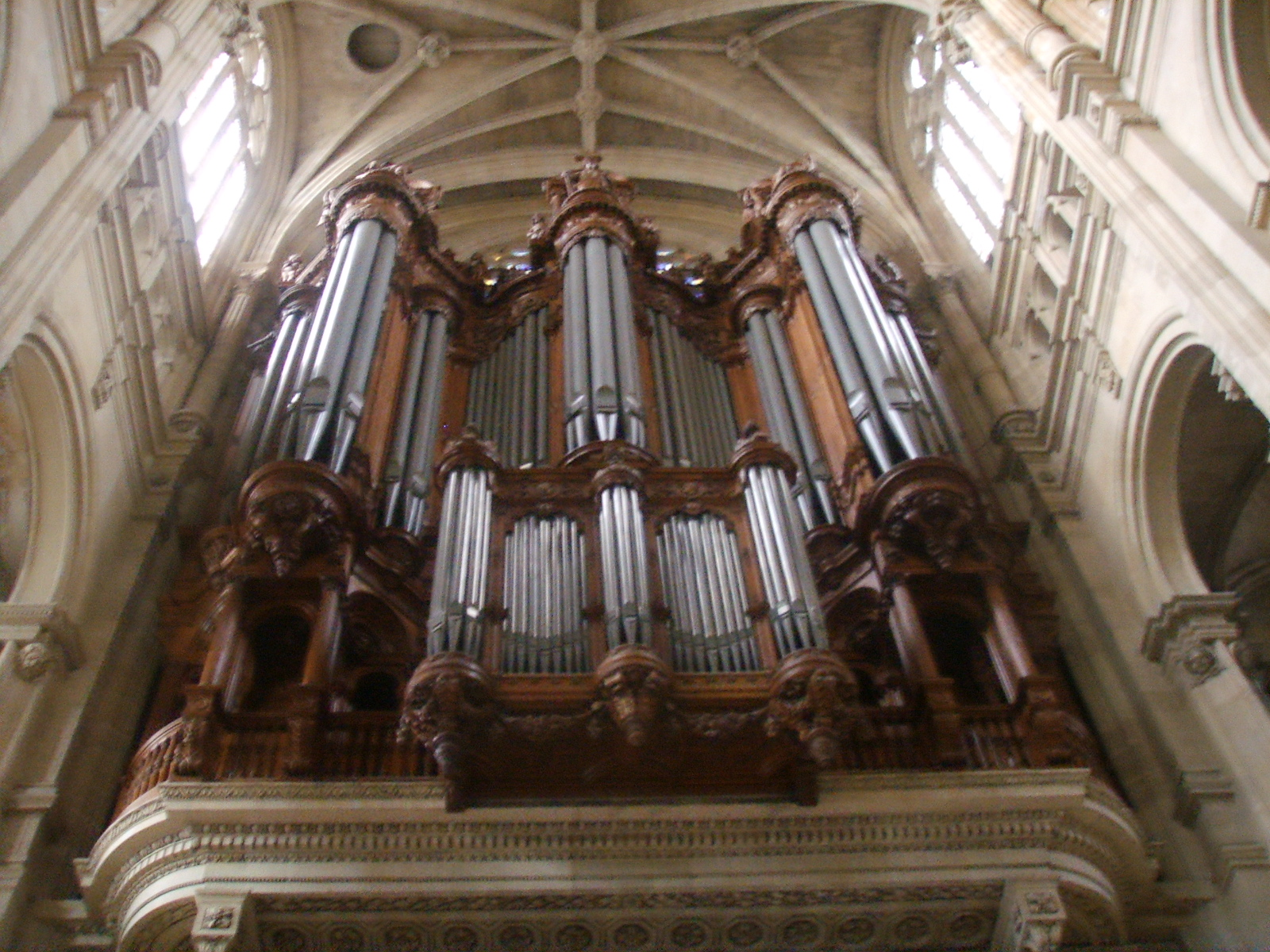 Eglise_di_Saint_Eustache organo inside